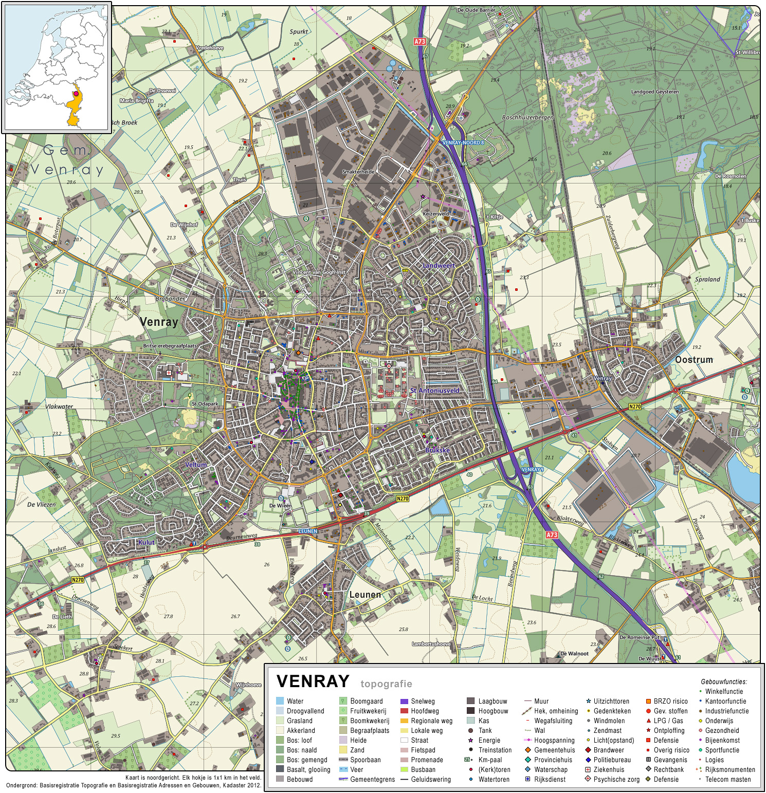 Topografisch beeld van de stad Venray. Op basis van de GML open geodata van de BRT/Top10NL (basisregistratie Topografie, Kadaster 2012), vrijgegeven door Kadaster op 30-11-2012 onder de Creative Commons BY licentie. Gebouwvlakken vanuit Open Geodata BAG extract (december 2012). Samenstelling en kleurenschema: Jan-Willem van Aalst, met QuantumGIS en Photoshop.